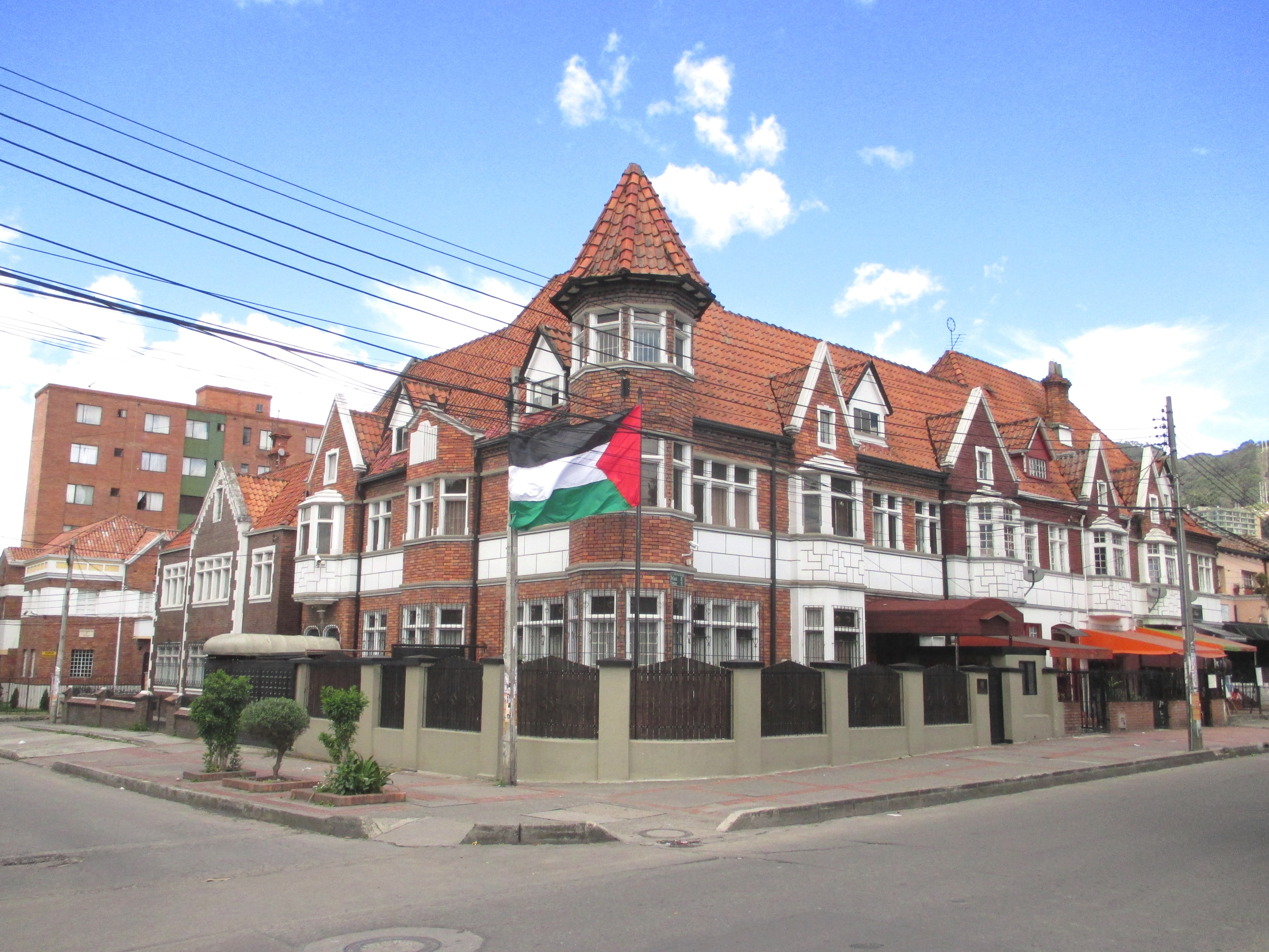 Bogotá, representación Palestina barrio Palermo